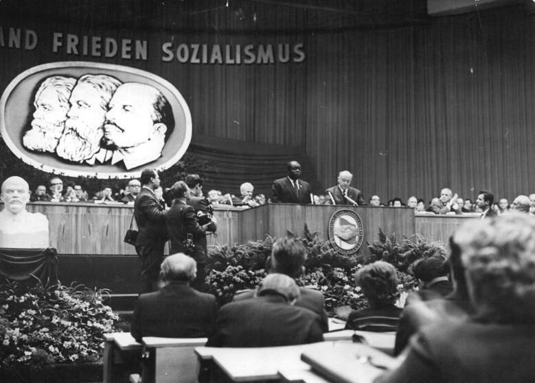 Zentralbild Kollektiv Me-Qu 19.1.1963 VI. Parteitag der SED vom 15.-21.1.1963 in der Werner-Seelenbinder-Halle in Berlin (5.Tag). UBz. Einen Höhepunkt erreichte die Schlußsitzung des 5. Beratungstages, als Henry Winston als vertreter der KP der USA seine Grußansprache hielt. (Heilig)